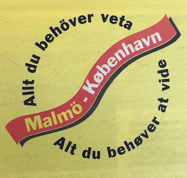 Malmö Köpenhamnstidningen logotype